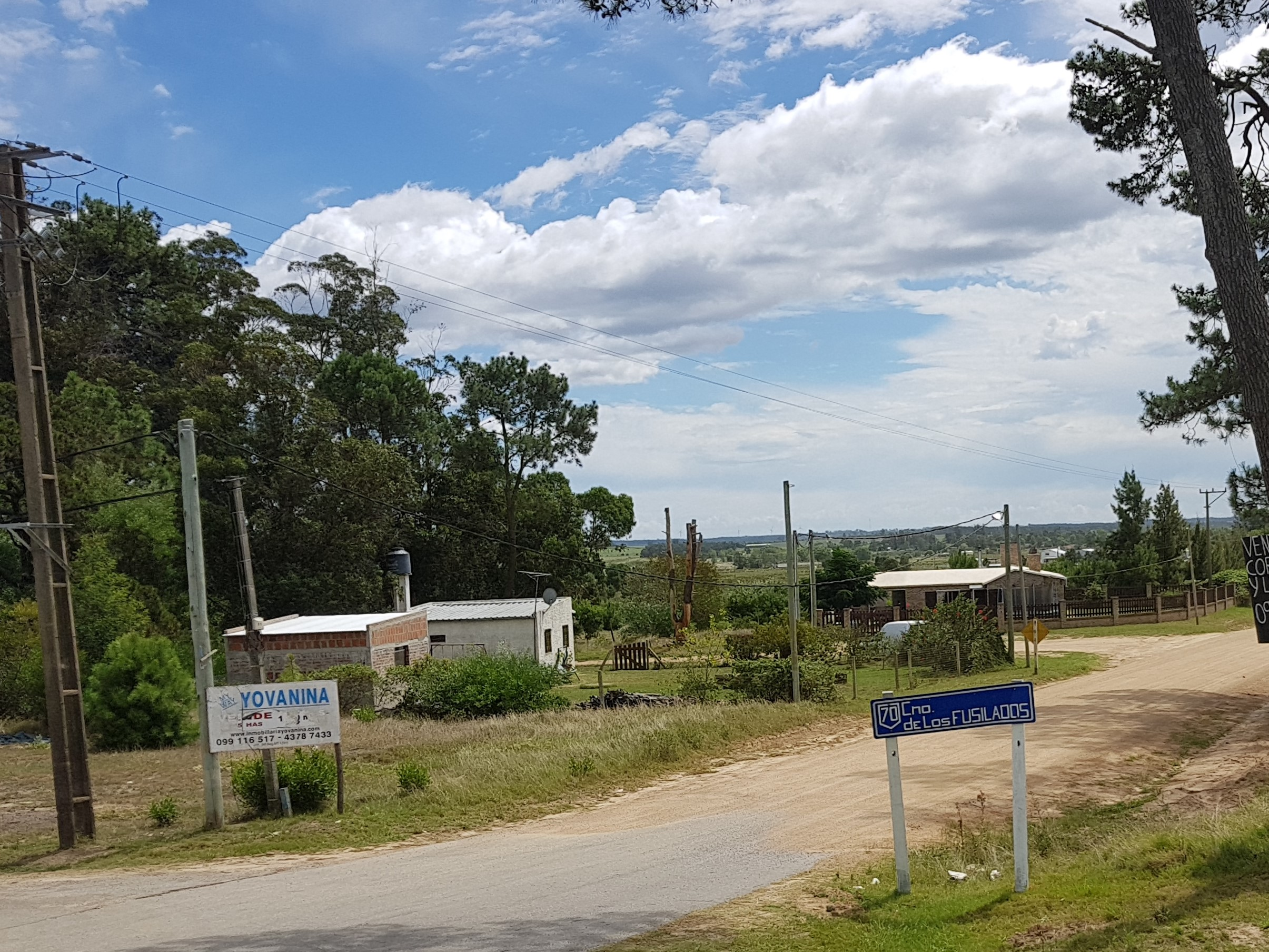 Ruta 70 a la altura de su interesección con la Ruta Interbalnearia. Canelones, Uruguay.